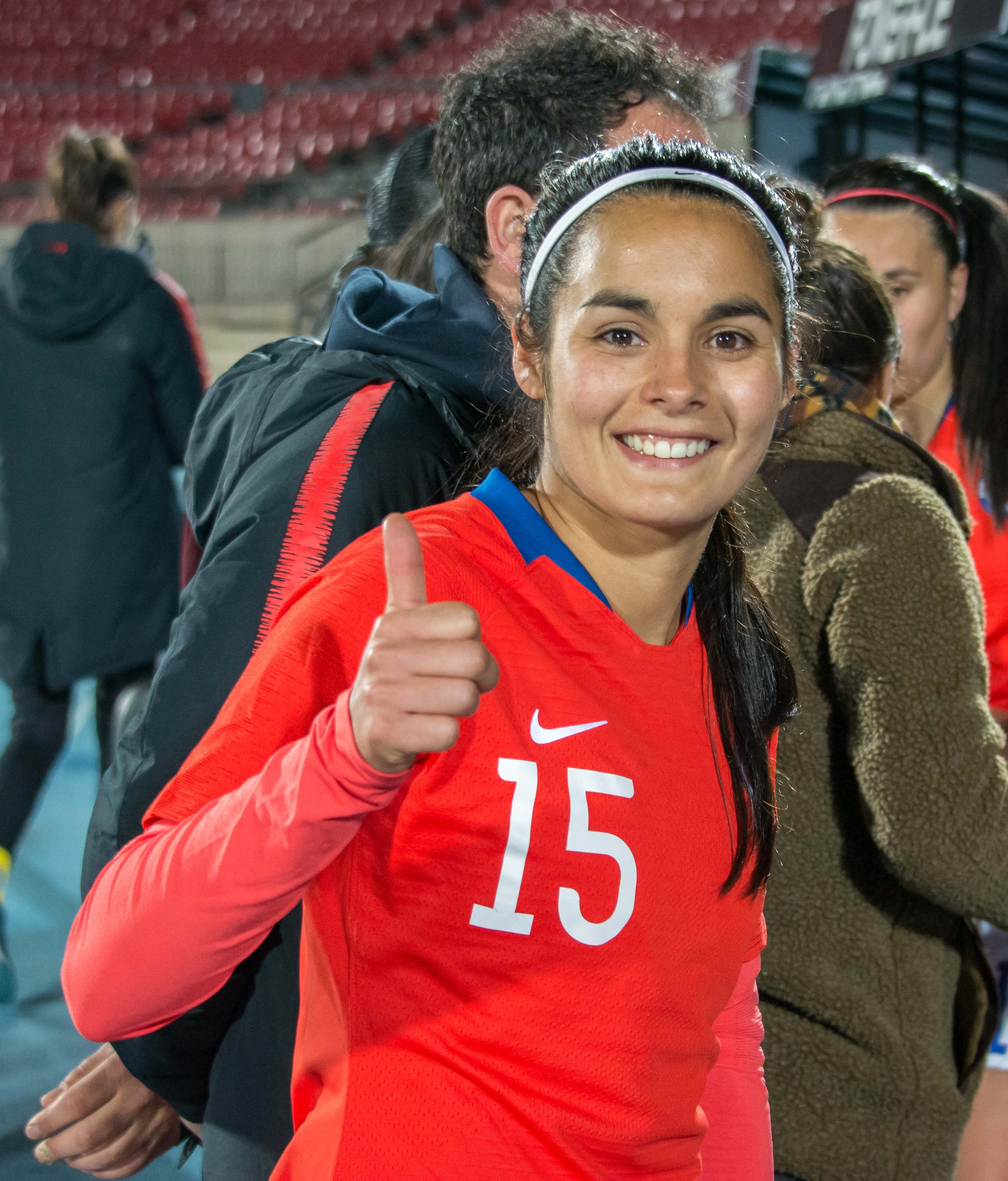 Su Helen Galaz, Chile v Colombia, Estadio Nacional, Ñuñoa, Santiago, Chile.